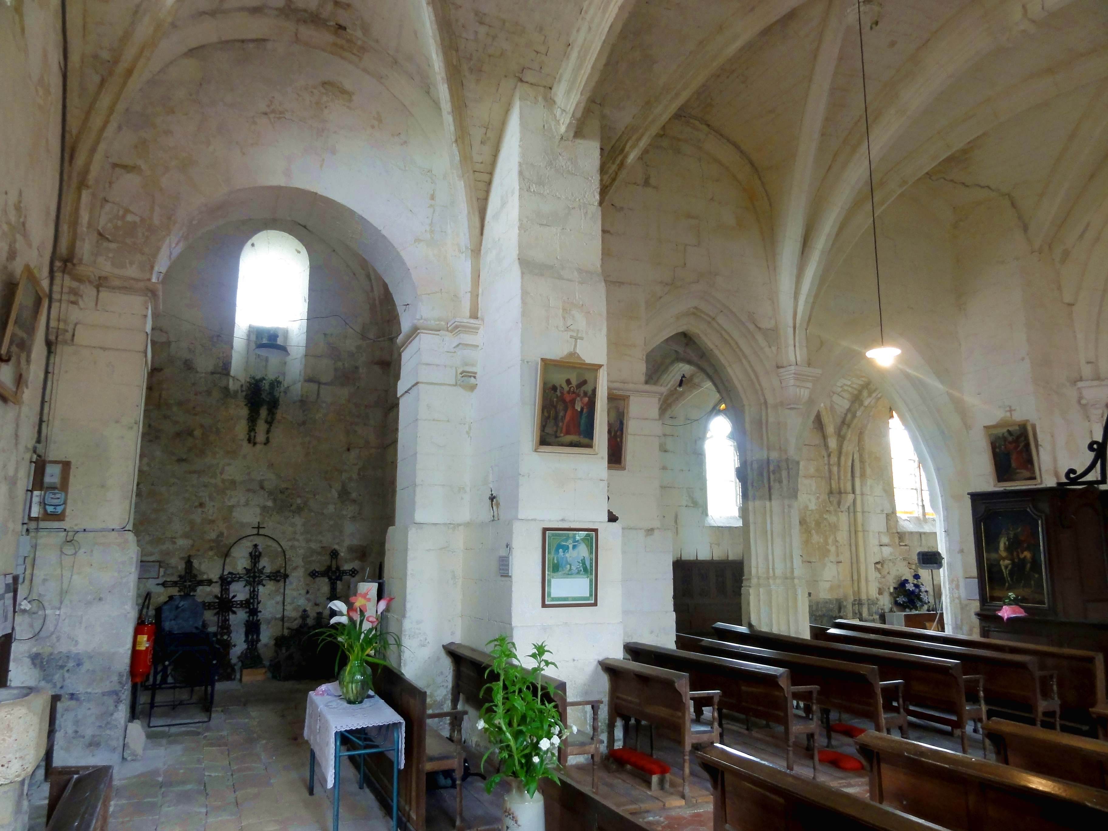 Intérieur de l'église - voir titre.